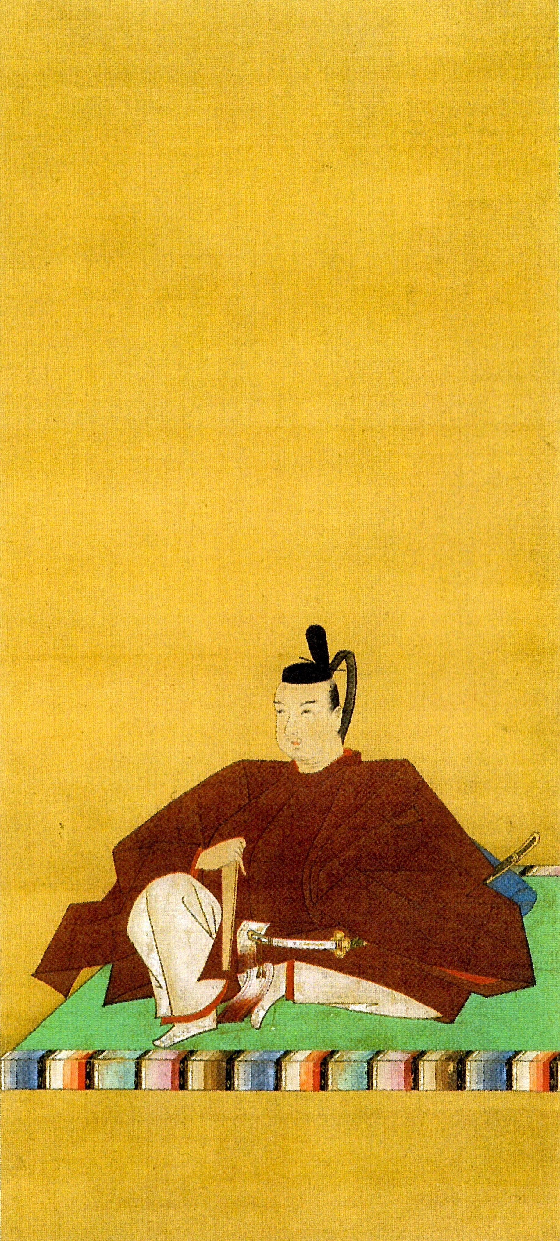 京極高豊の肖像。